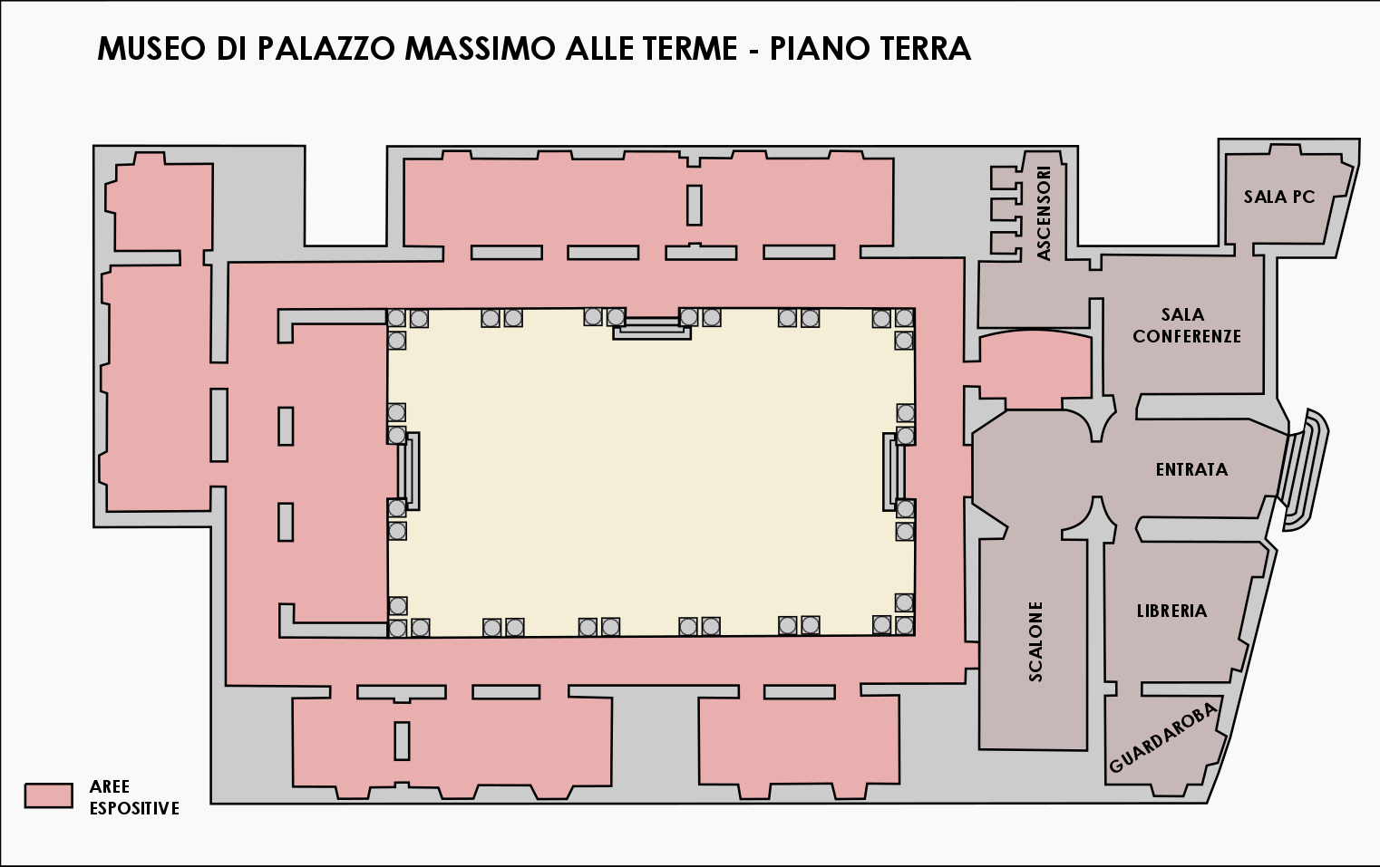 Planimetria del piano terra del Museo nazionale romano di palazzo Massimo a Roma